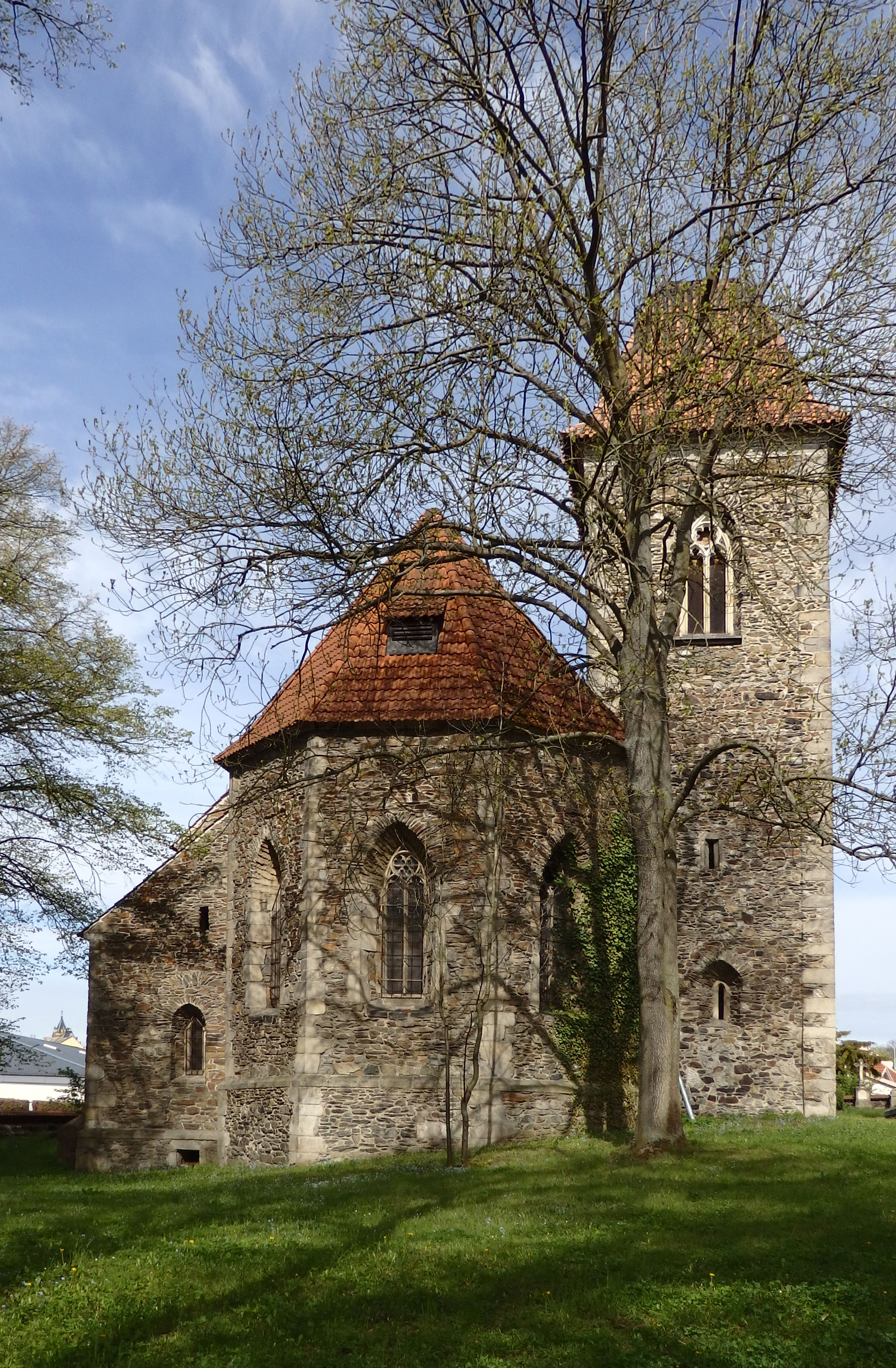 Pohled východní